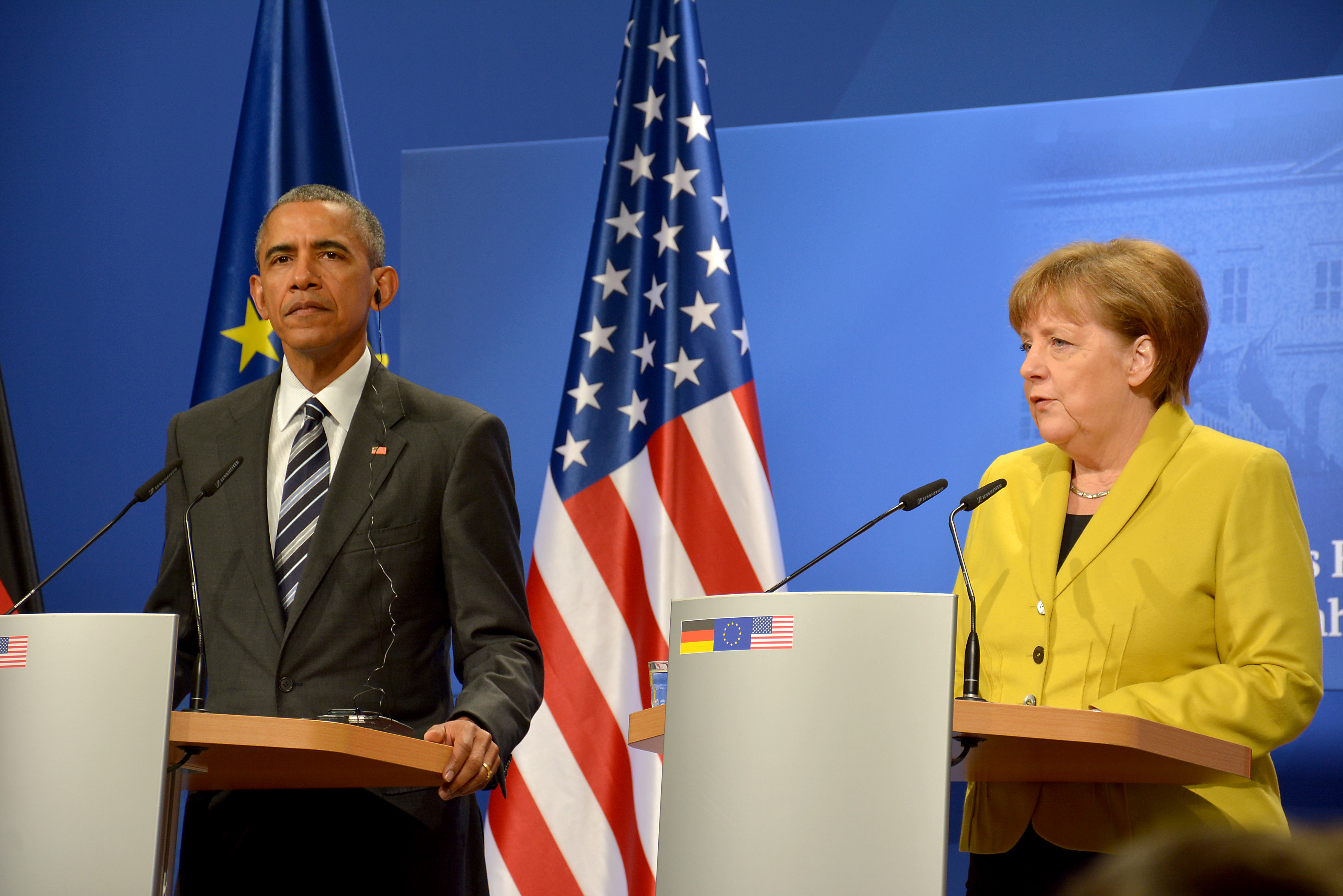 Pressekonferenz von Bundeskanzlerin Merkel und US-Präsident Obama am ersten Besuchstag, 24.04.2016, im Schloss Herrenhausen in Hannover.